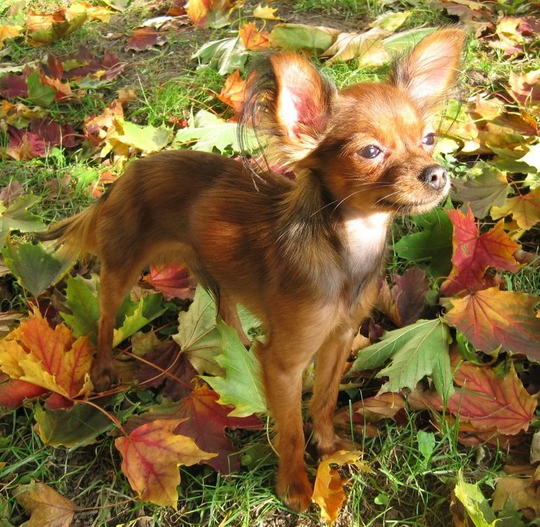 RusskiyToy